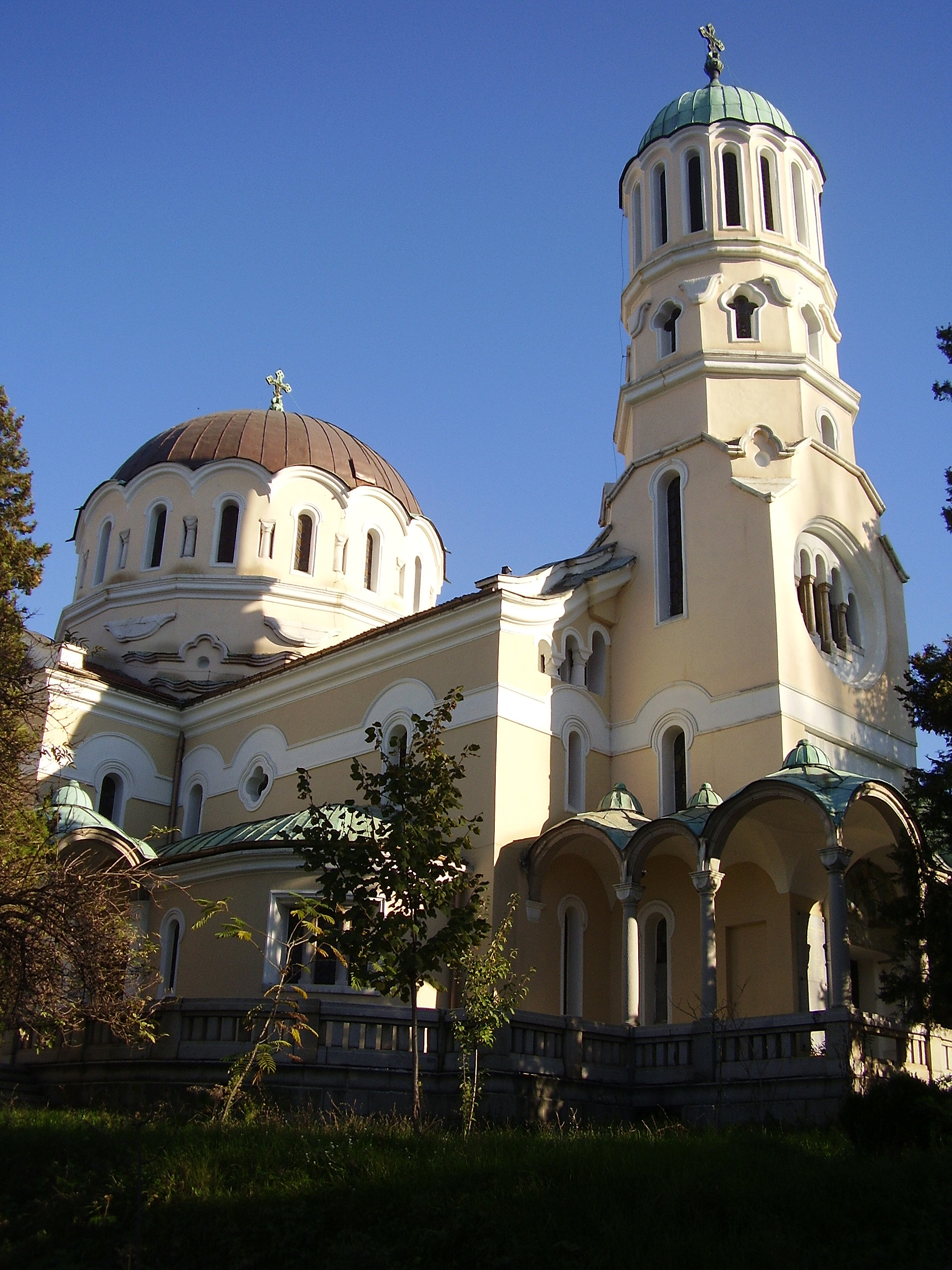 Църквата "Свети Великомъченик Мина" - гр.Кюстендил